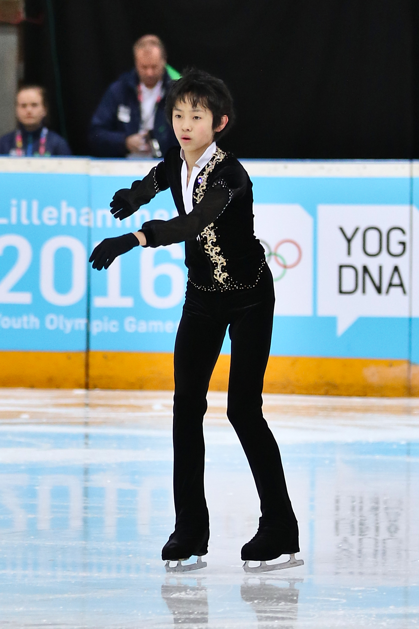 Lillehammer 2016 - Figure Skating Men Short Program - Koshiro Shimada